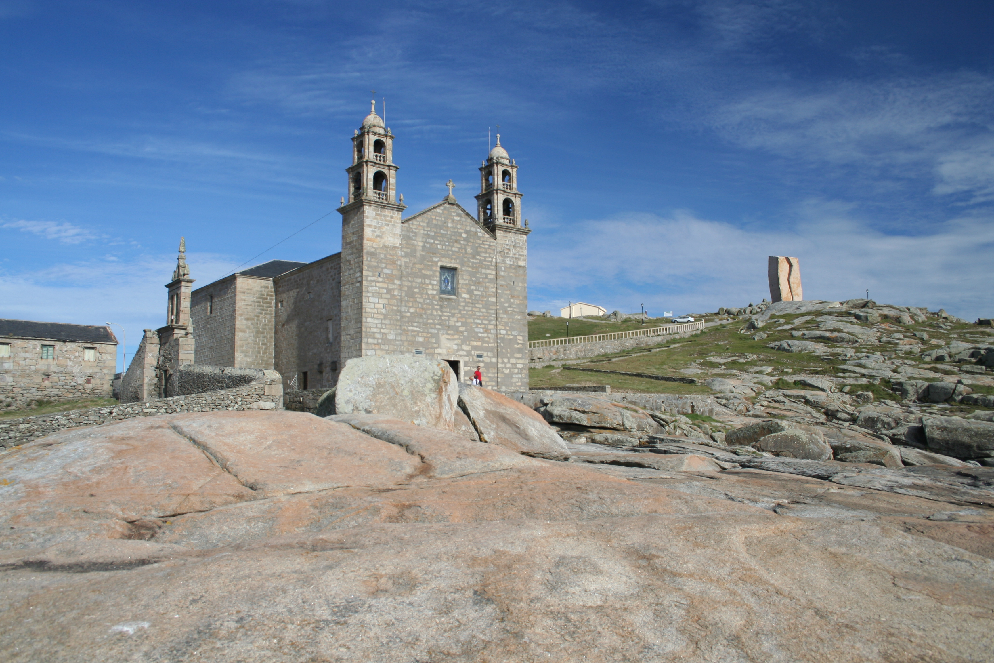 Vistas do Santuario da Virxe da Barca, Muxía, Galiza